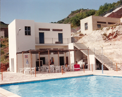 Fotografía de la piscina municipal de Segart (Valencia)